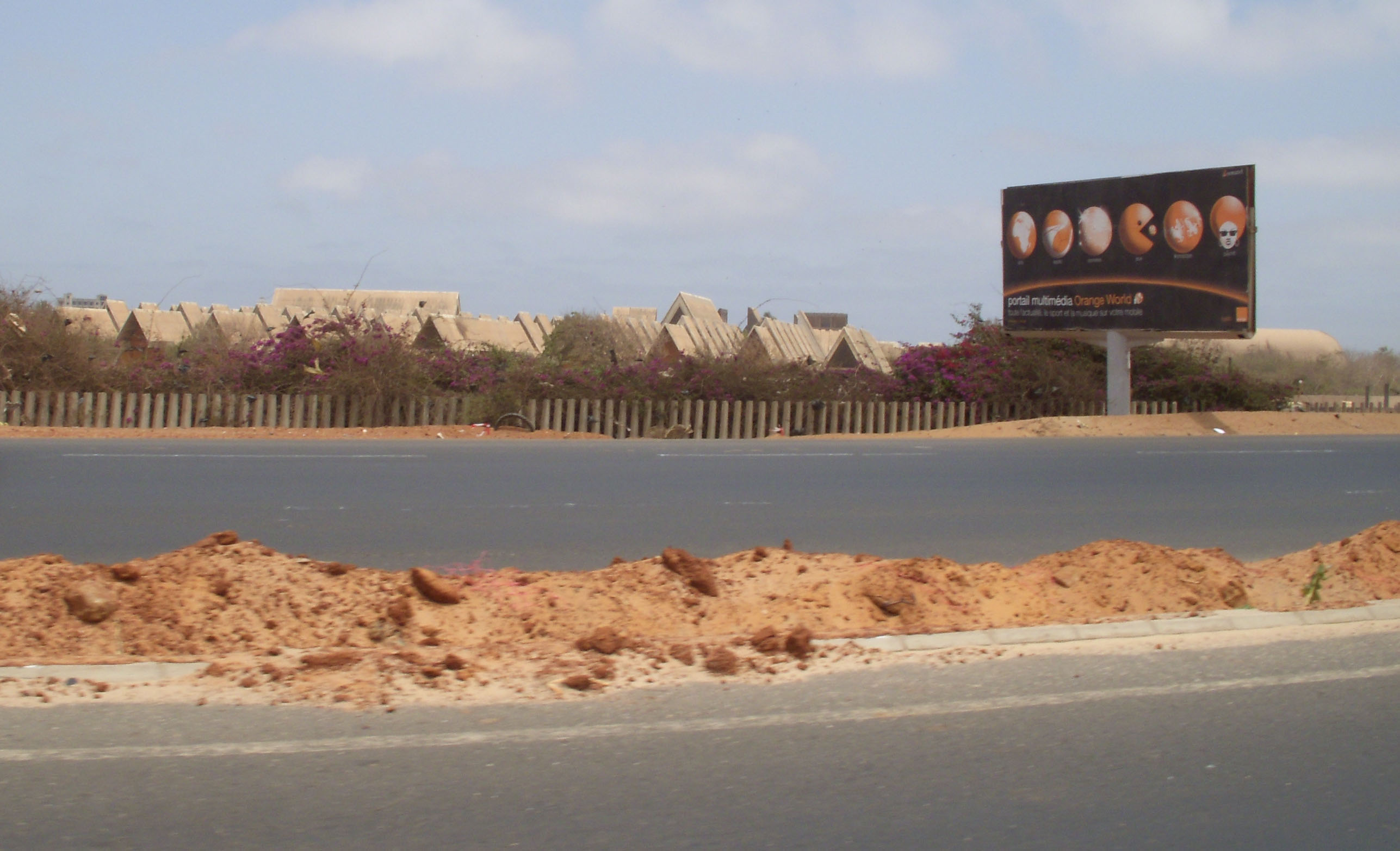 Pannea publicitaire Orange à Dakar (Sénégal)